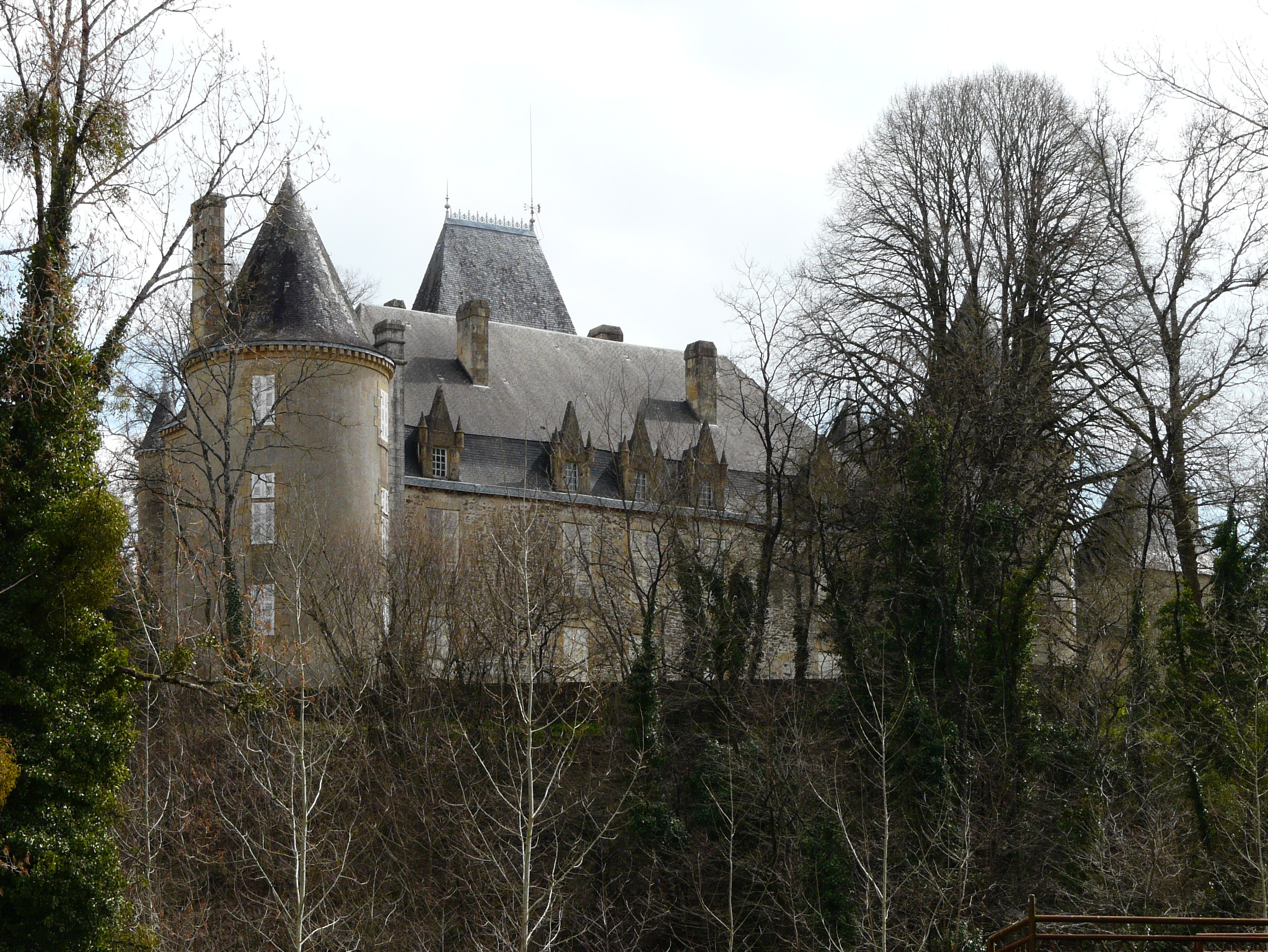 Le château de Rouffiac, Angoisse, Dordogne, France Object location45° 25′ 23.9″ N, 1° 10′ 02″ E .